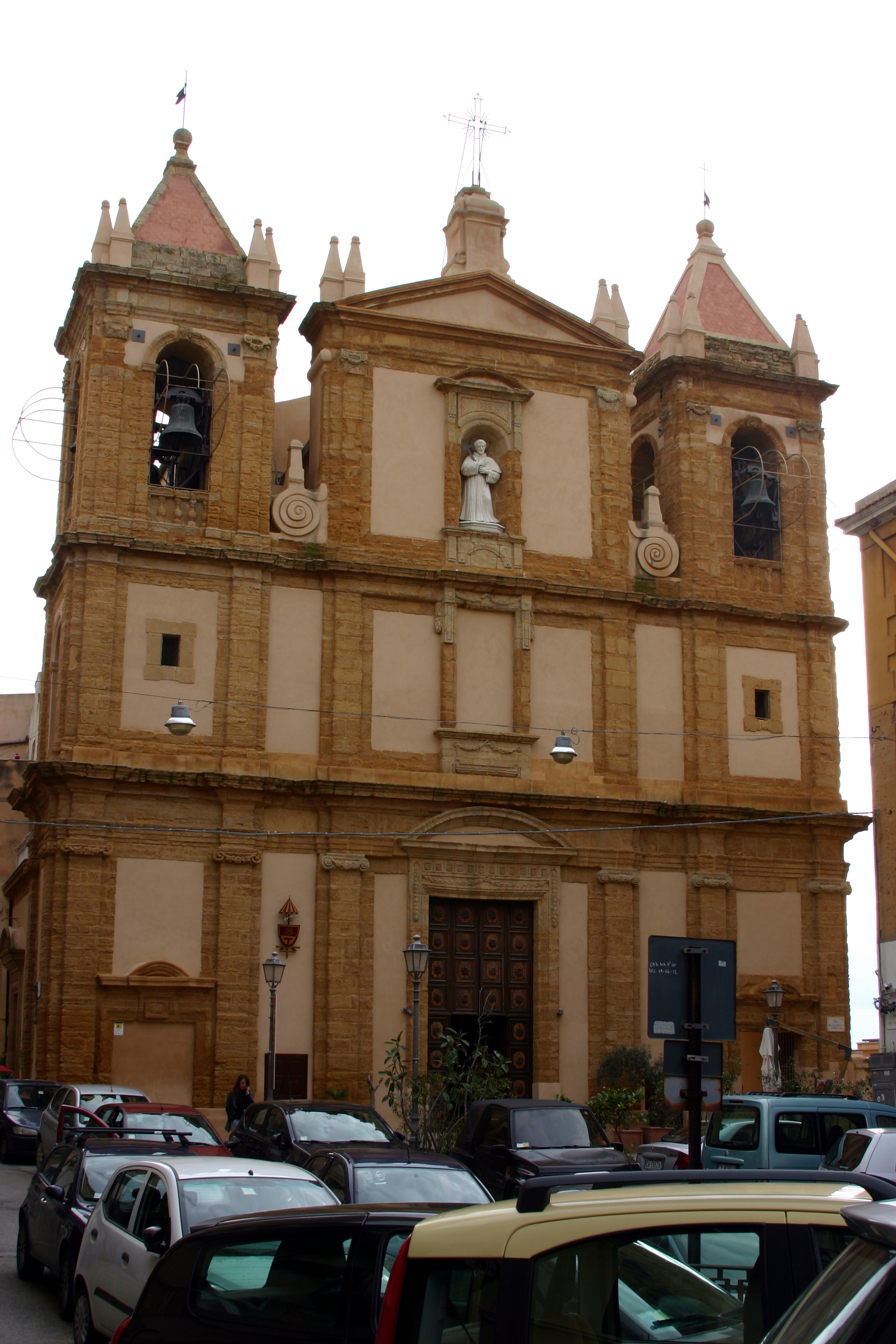 San Francesco d'Assisi